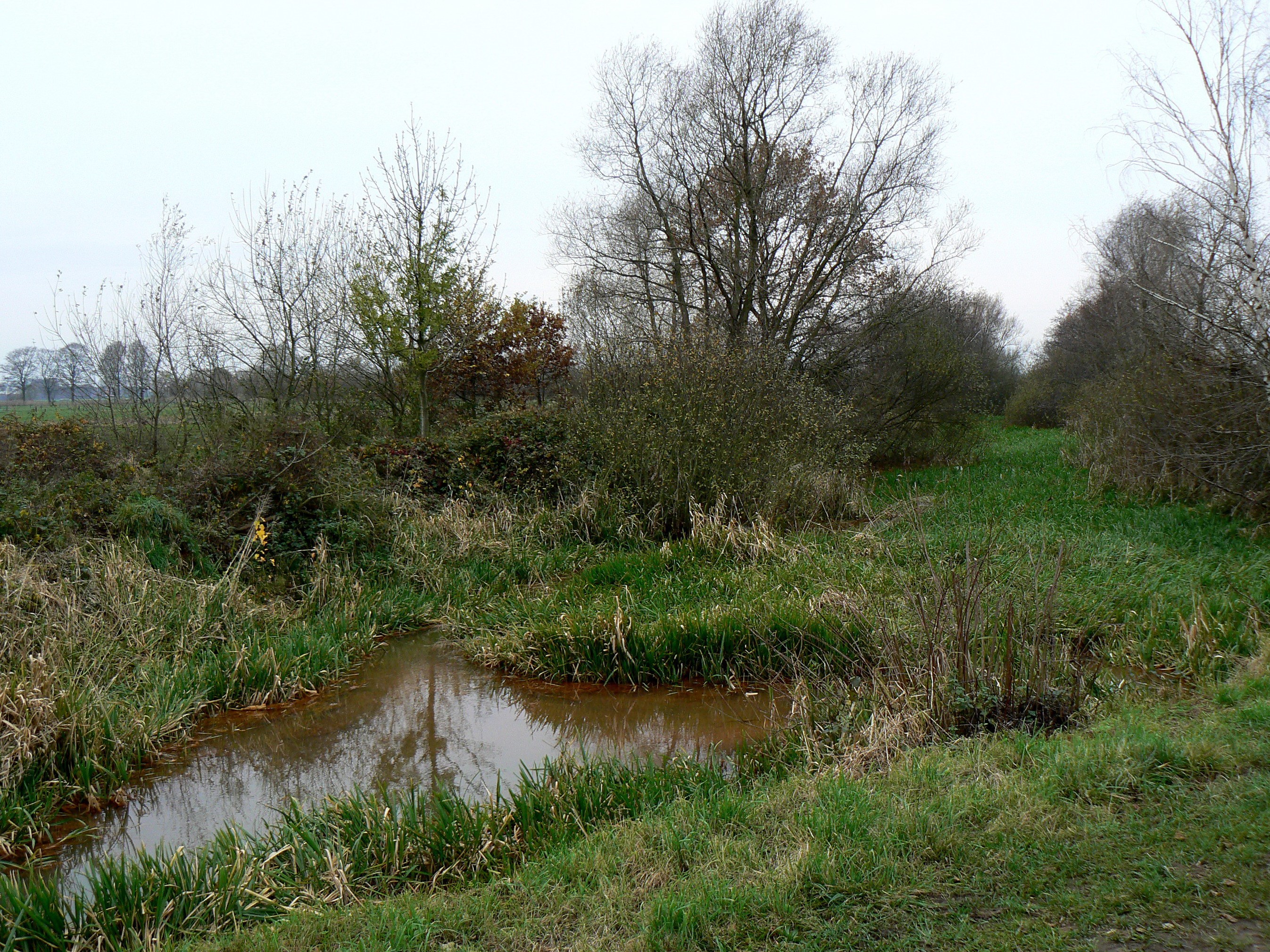 Antitankgracht, Stabroek (Belgium)